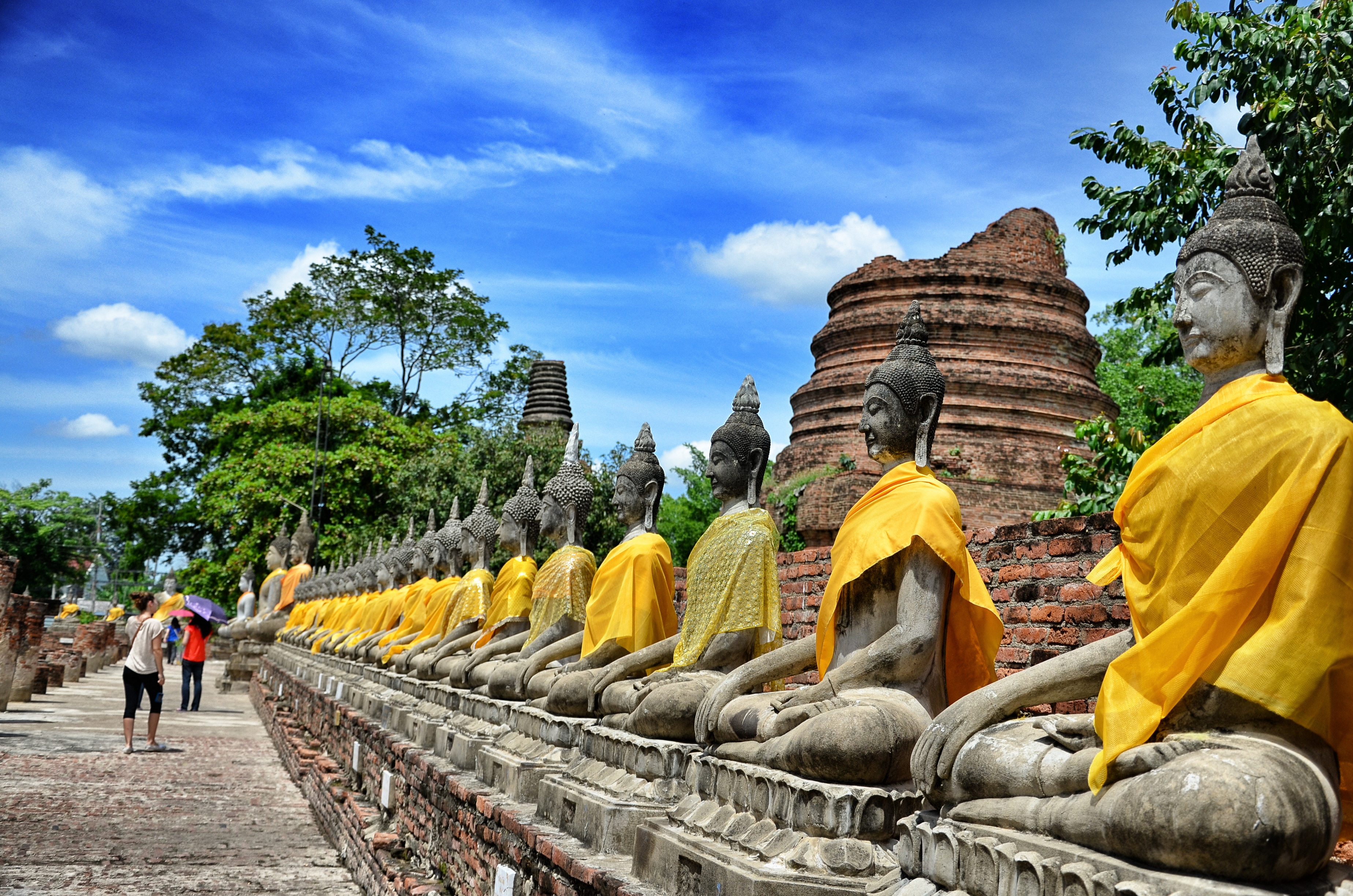 วัดใหญ่ชัยมงคล